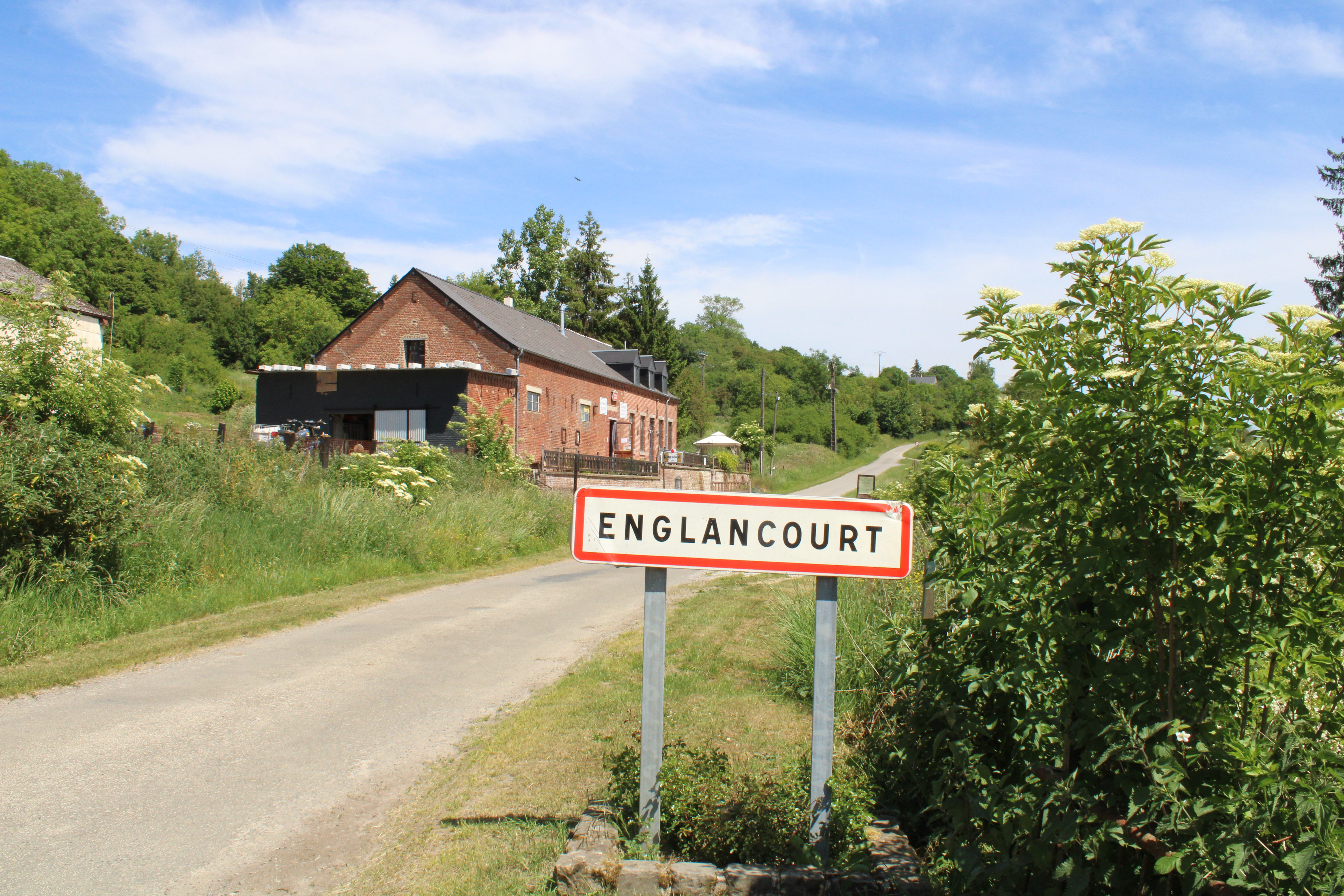 Entrée du village